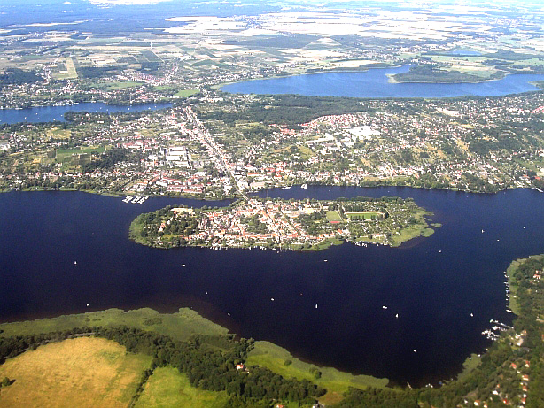 Luftbildaufnahme von Werder (Havel) – im Vordergrund, von links nach rechts fließend, die Havel. Im Hintergrund der Glindower See (links) und der Große Plessower See (rechts).